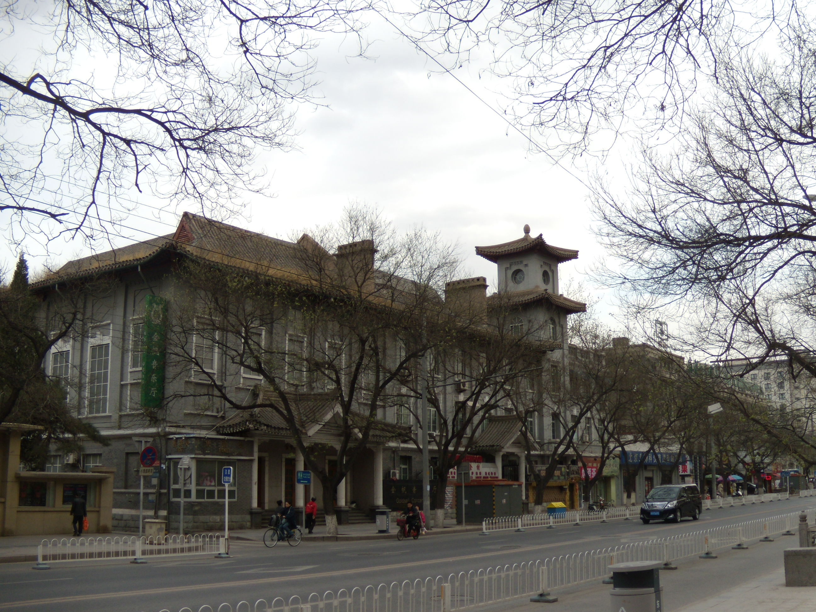 八面槽救世军中央堂，位于王府井大街